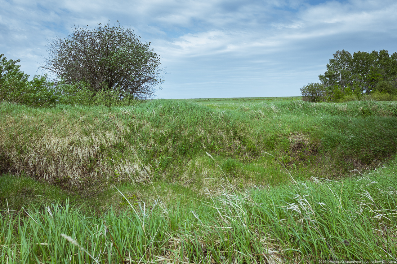 Археологический памятник Муромский городок, Самарская Лука, Россия